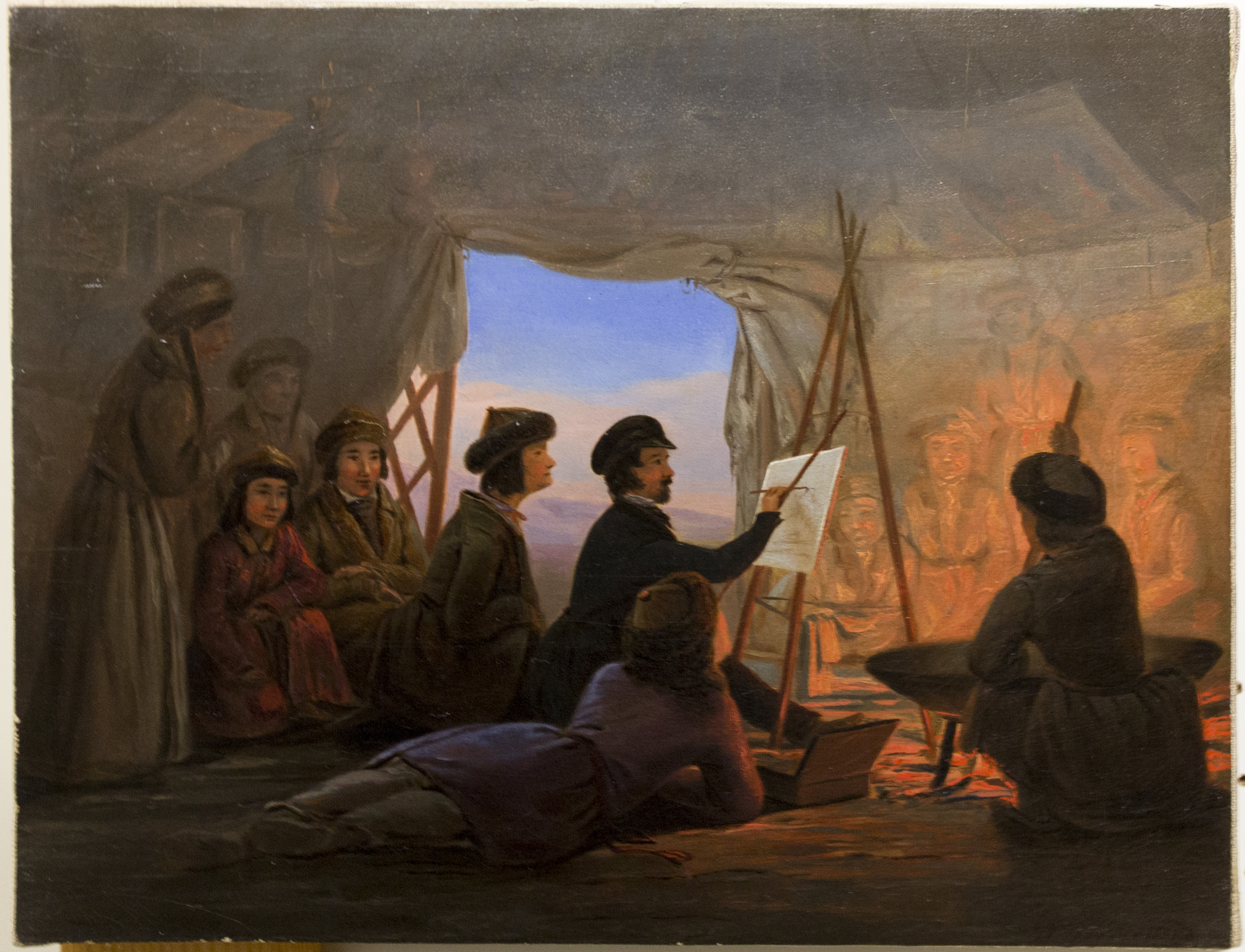 GLAM-on-Tour: Wiki goes MEK! Wikipedianer fotografierten am 25. und 26. November 2017 im Museum Europäischer Kulturen. This photo was taken during a project supported by WMDE. Gefördert von / Supported by: Wikimedia Deutschland, Museum Europäischer Kulturen Vom Maler Wilhelm Kiesewetter. Wilhelm Kiesewetter (Maler), Selbstporträt; Ident.Nr. II E 15; Ohne Titel (Kiesewetter in einer kalmückischen Jurte) Bestand vom MEK (Museum Europäischer Kulturen) im Schaudepot.